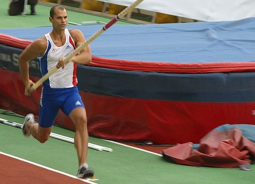 Romain Mesnil en action